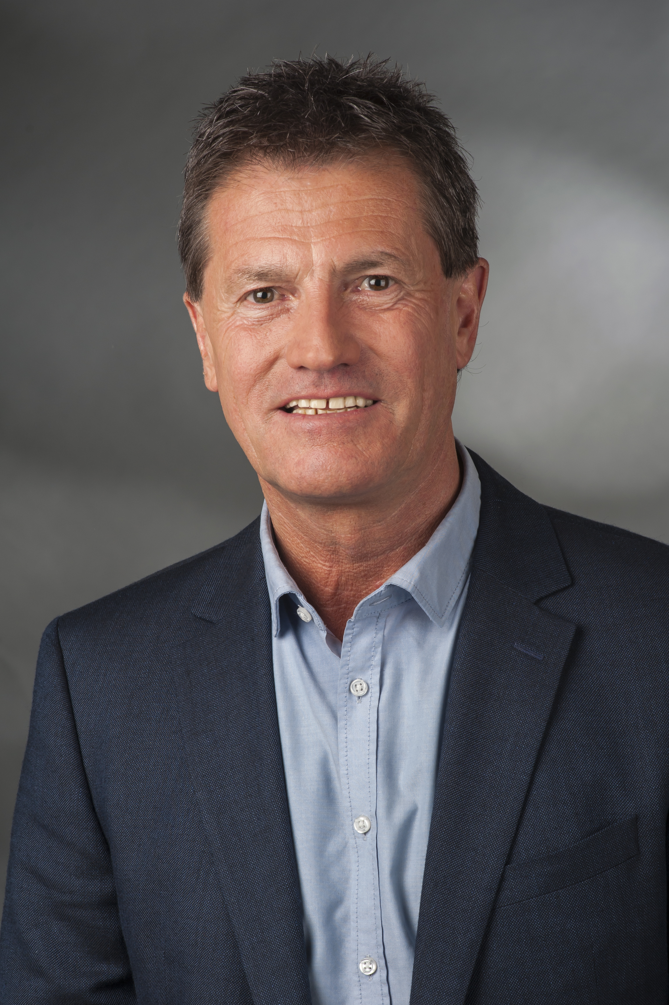 Detlev Pilger (* 1955 in Koblenz) ist ein deutscher Lehrer und Politiker der SPD. Seit dem 22. Oktober 2013 gehört er dem Deutschen Bundestag an.